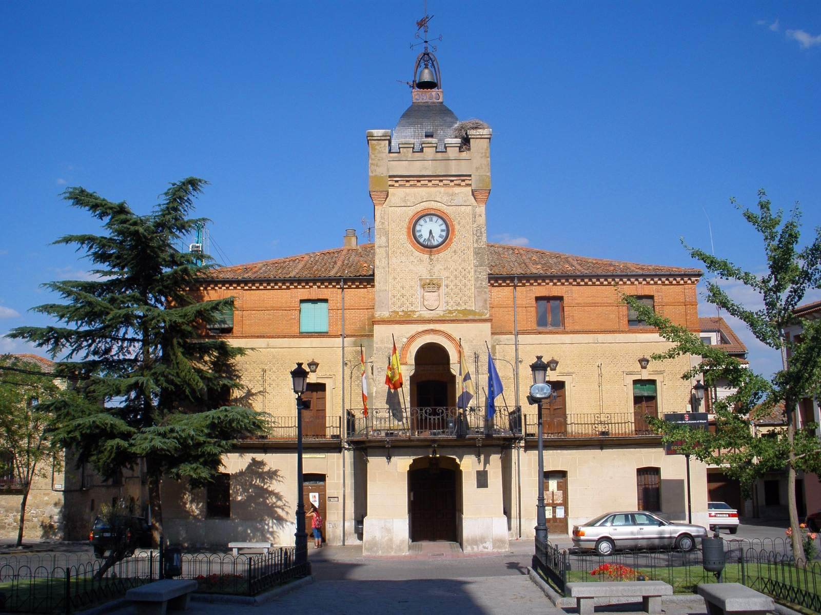 Ayuntamiento de Carbonero el Mayor (Segovia)